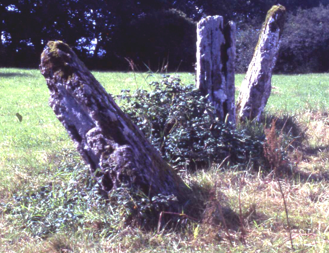 Menhirreihe